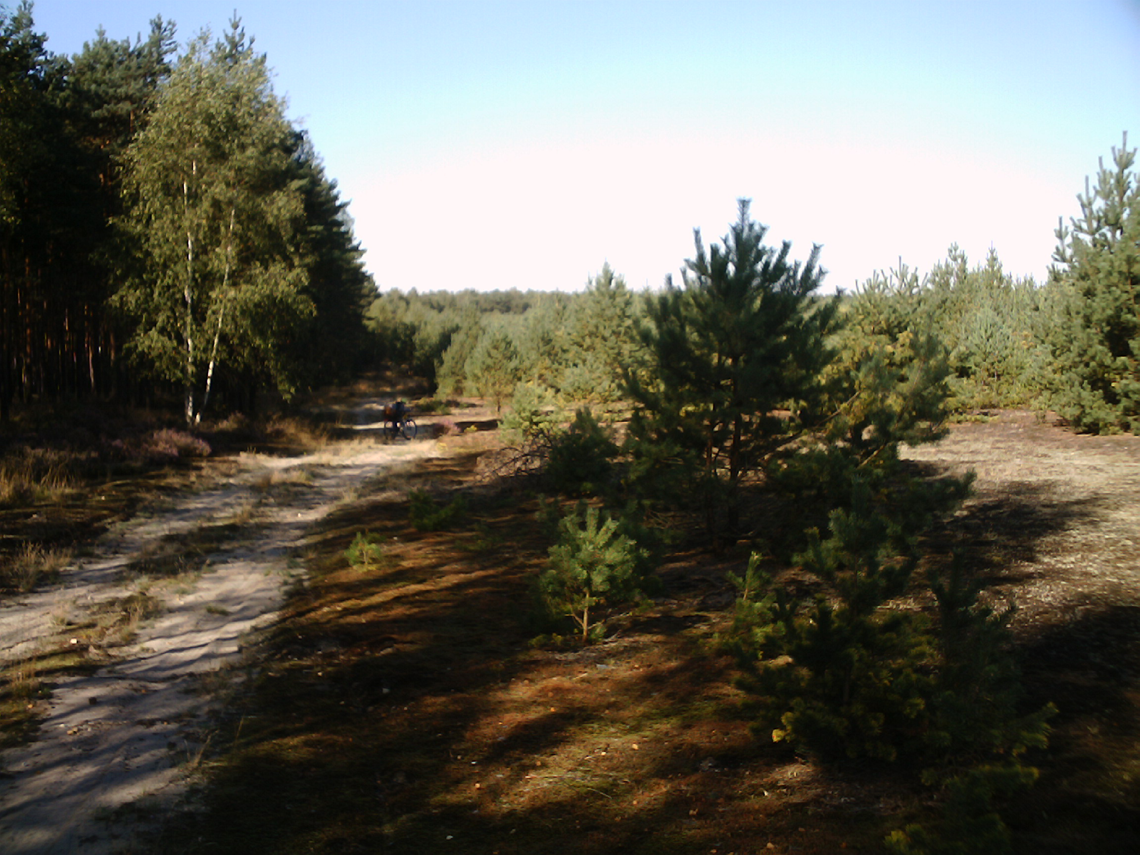 Der Naturpark bei Kraupa